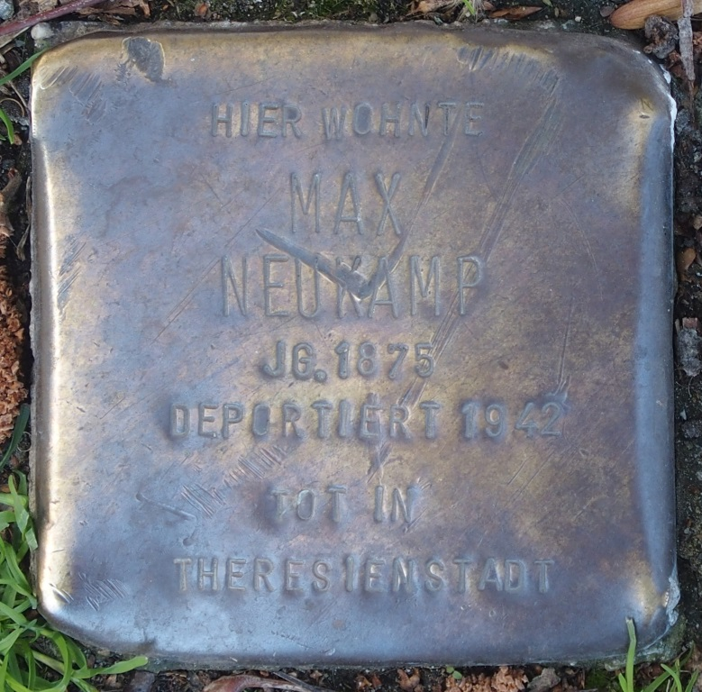 Stolperstein in Soest Teichmühlengasse 1, Max Neukamp